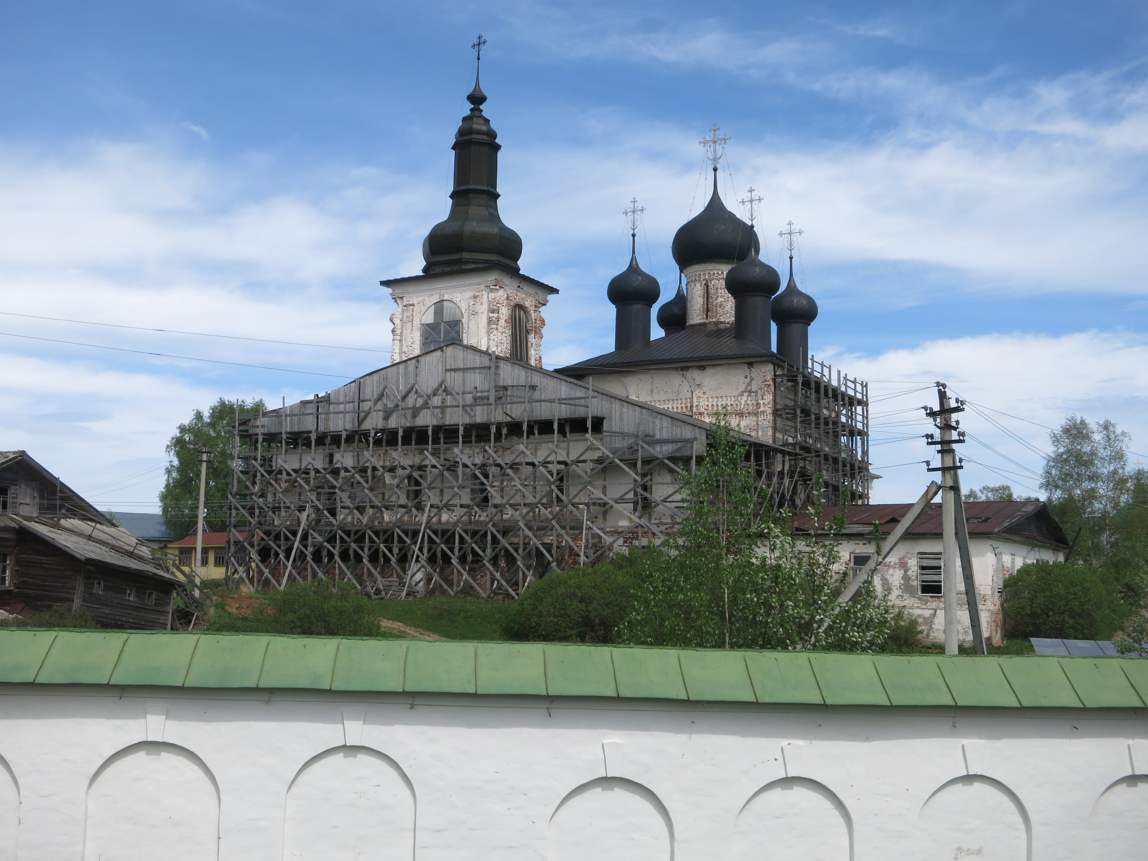 Горицкий монастырь: Воскресенская и Покровская церкви